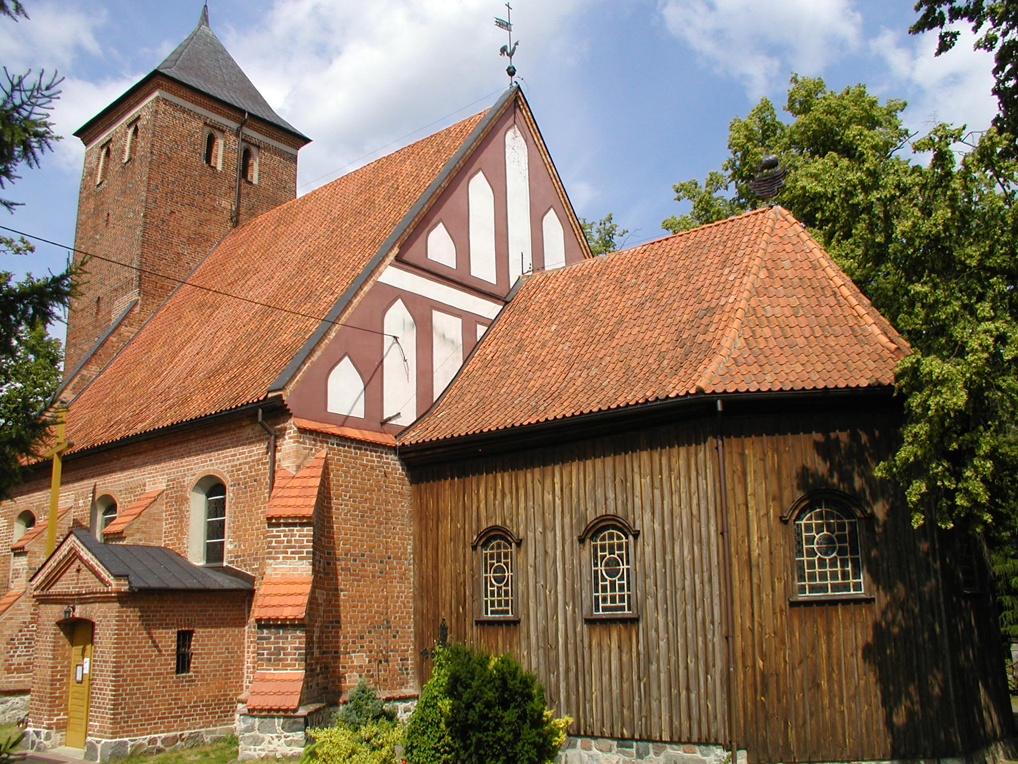 Grodziczno - kościół parafialny pw. św. Piotra i Pawła wraz z cmentarzem przykościelnym